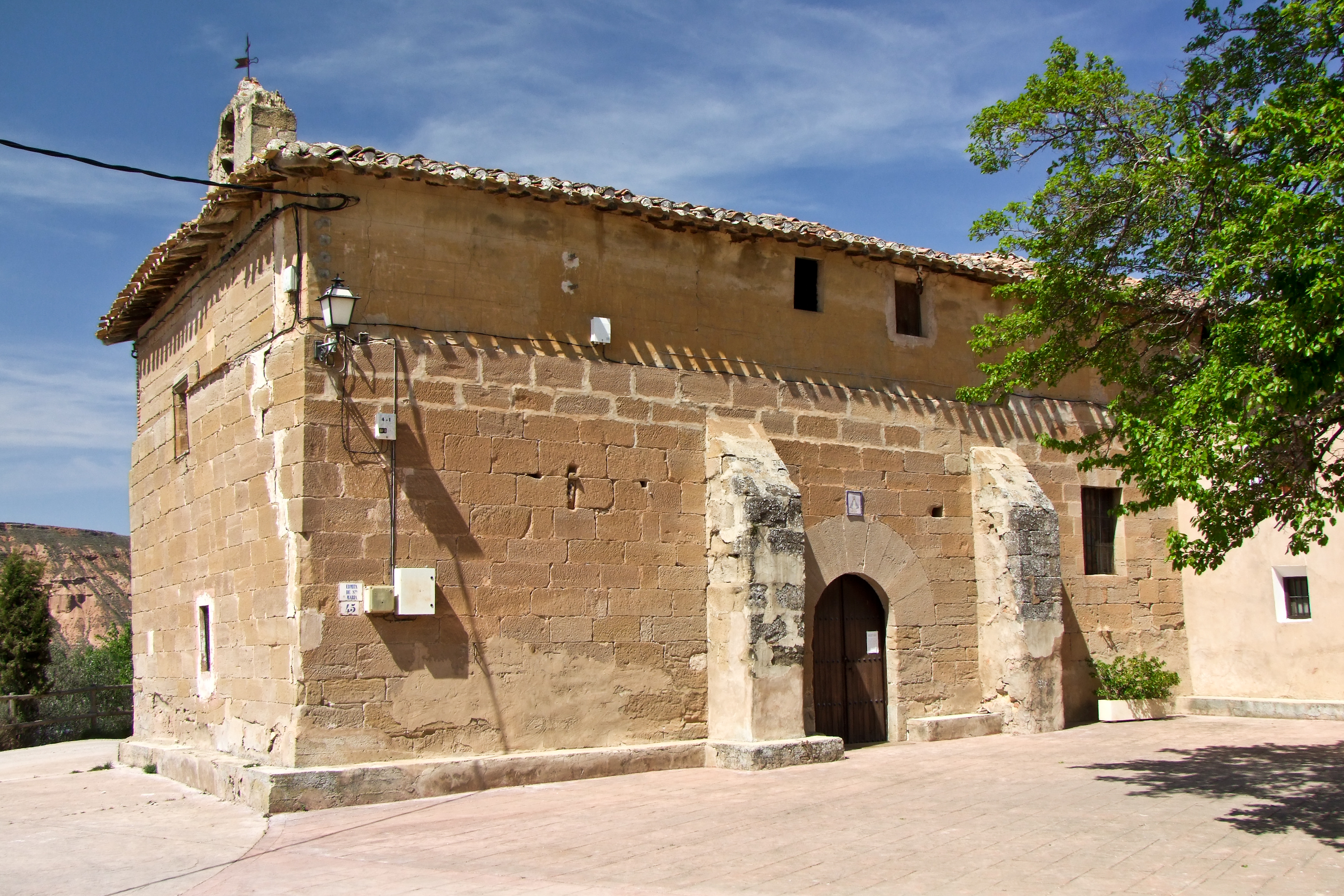 Ermita de la Virgen del Cortijo en la localidad de Murillo de Río Leza, La Rioja - España